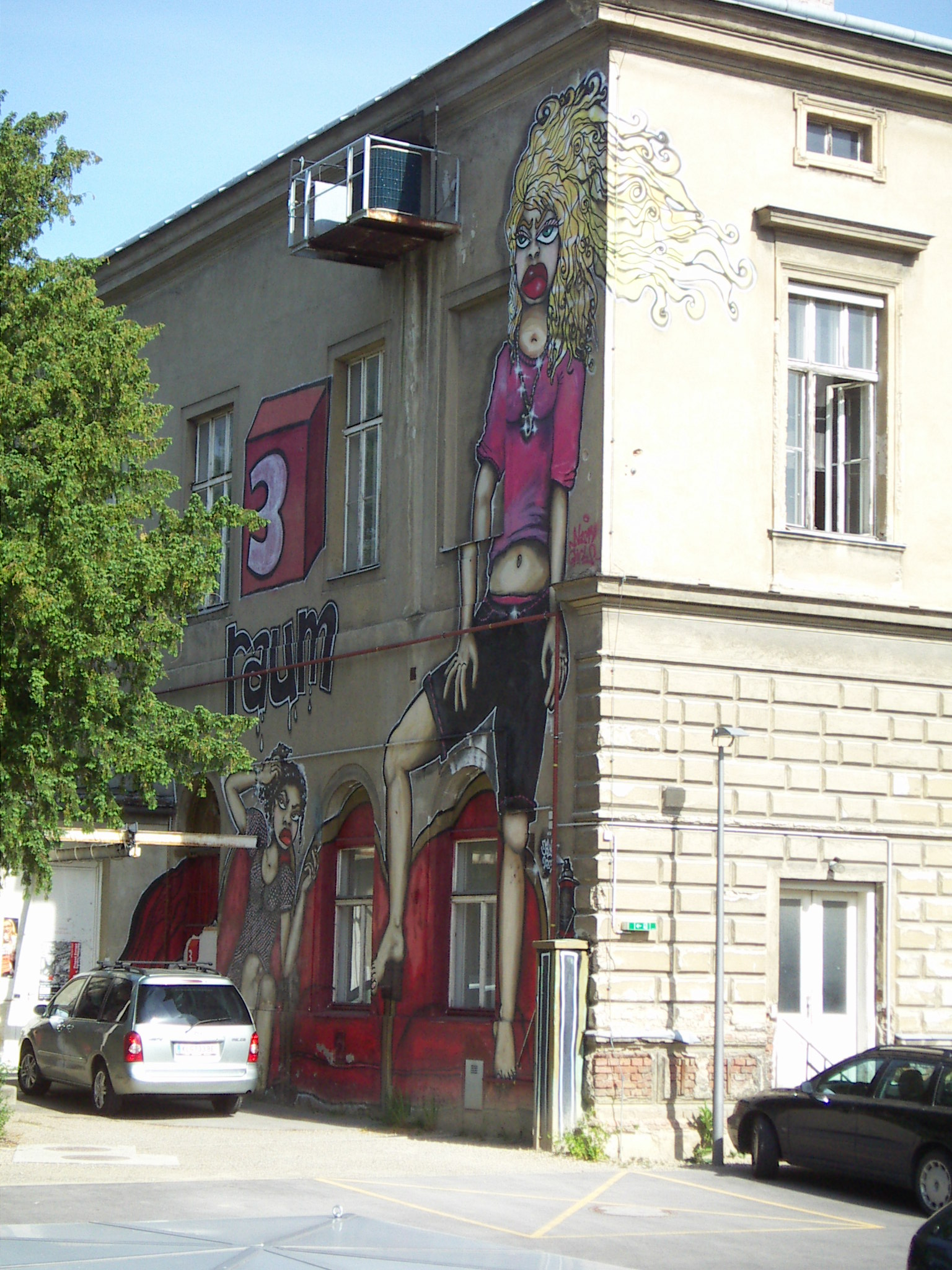 Universität für Musik und darstellende Kunst Wien